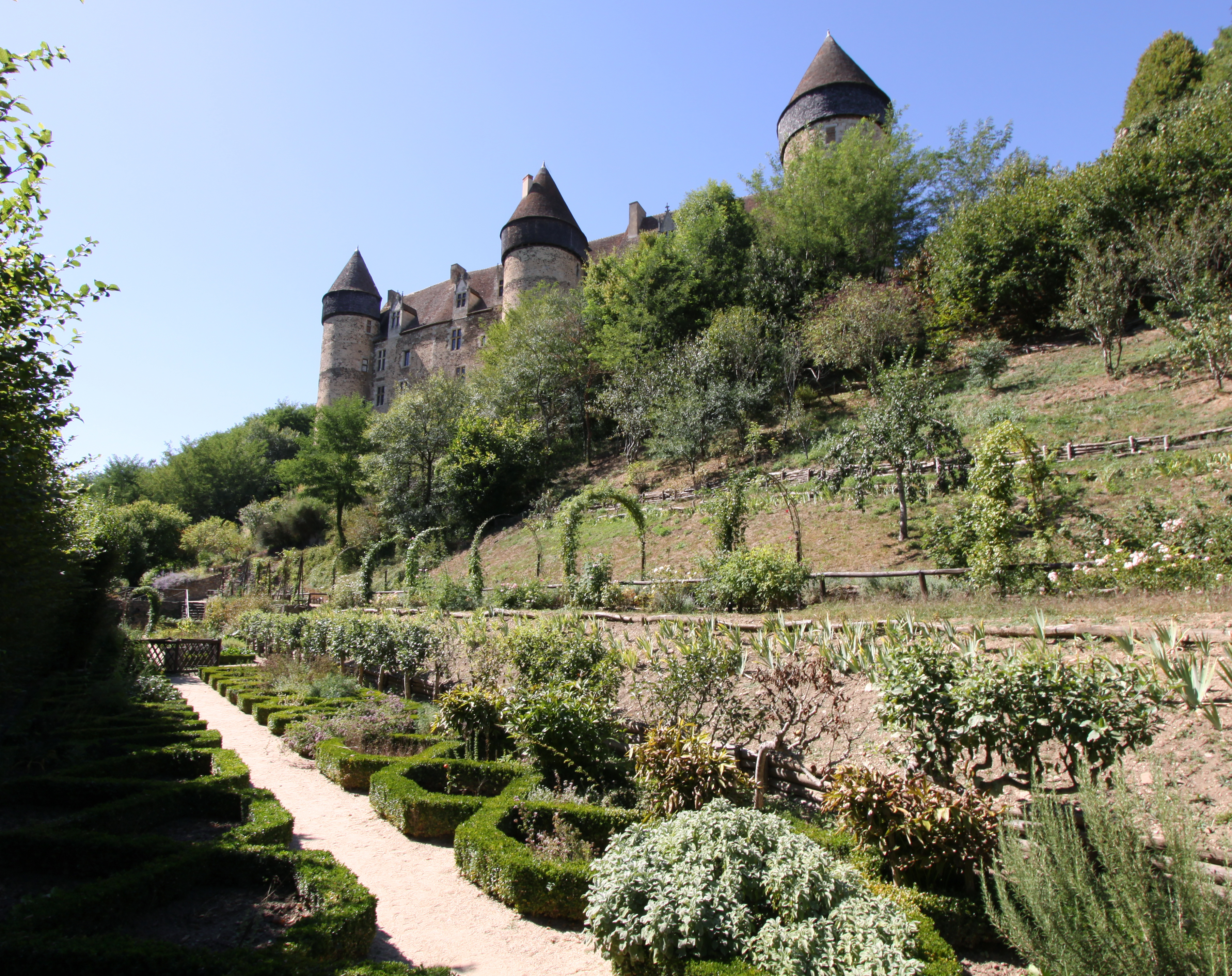 Burg Culan im französischen Département Cher - Gartenanlage